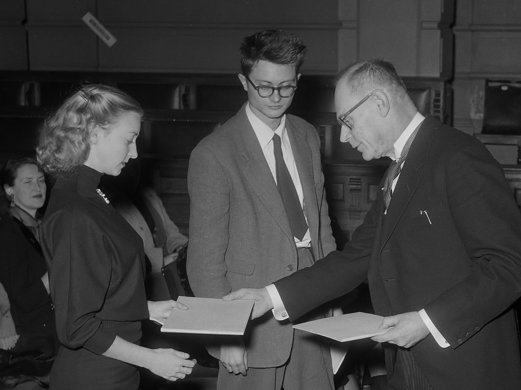 Uitreiking Reina Prinsen Geerligs Prijs in aula van de Universiteit van Amsterdam aan beide winnaars, Remco Campert en Ellen Warmond, door P.J. Prinsen Geerligs 24 november 1953